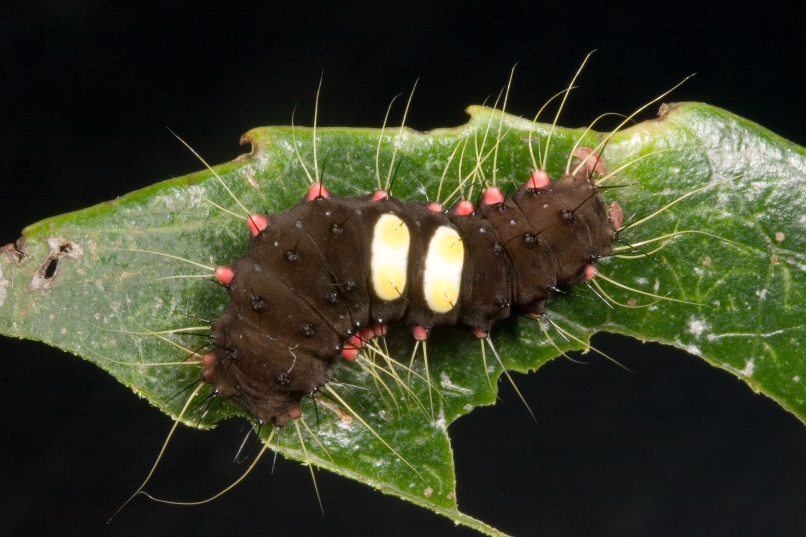 Amesia sanguiflua viriditincta Hampson, 1919 釉彩螢斑蛾